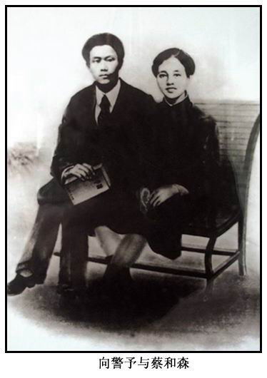 向警予和蔡和森的结婚照